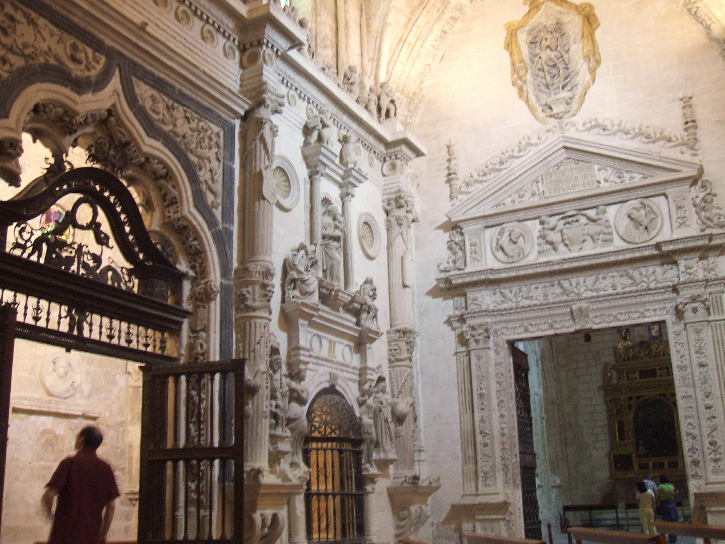 Capillas de los Muñoz y de los Caballeros, en la Catedral de Cuenca